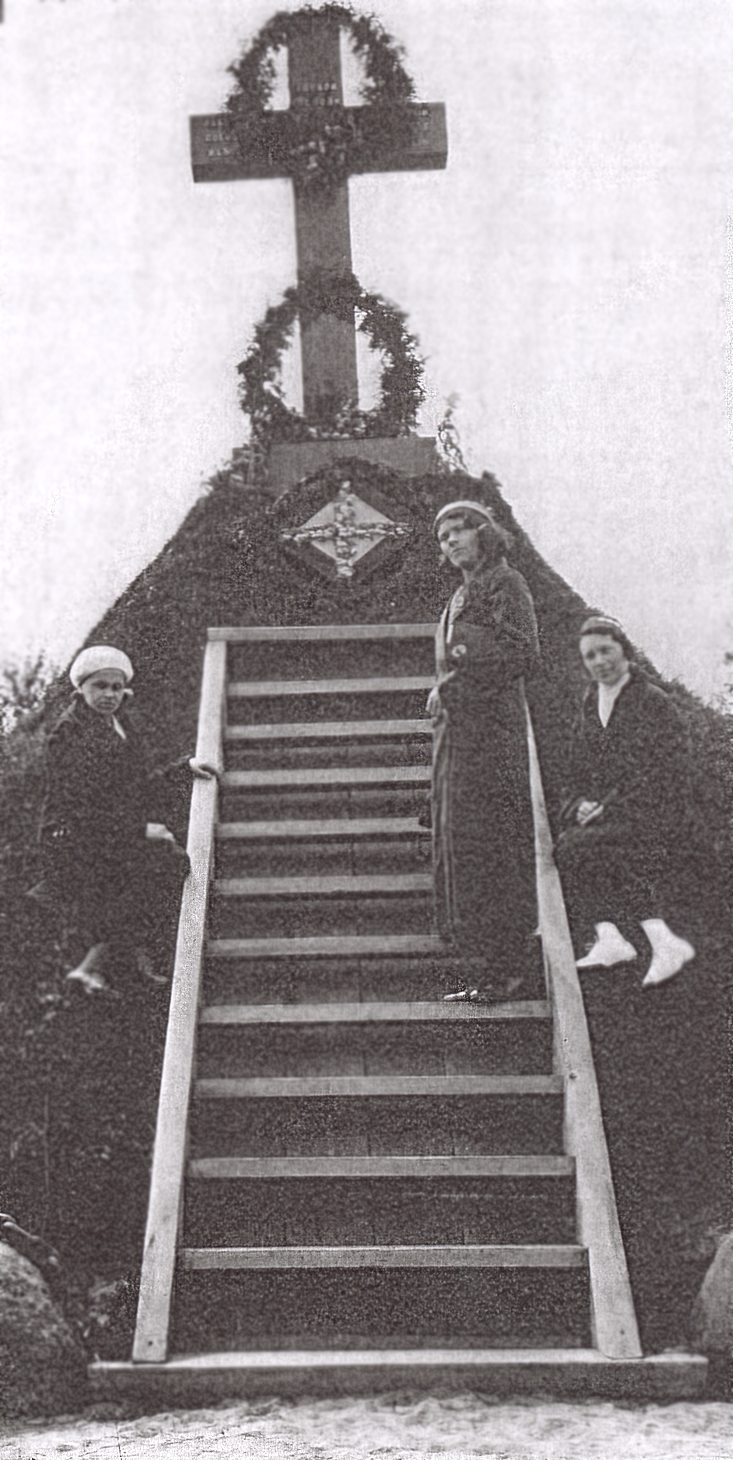 Information кладбище Северо- Западной армии Нарва